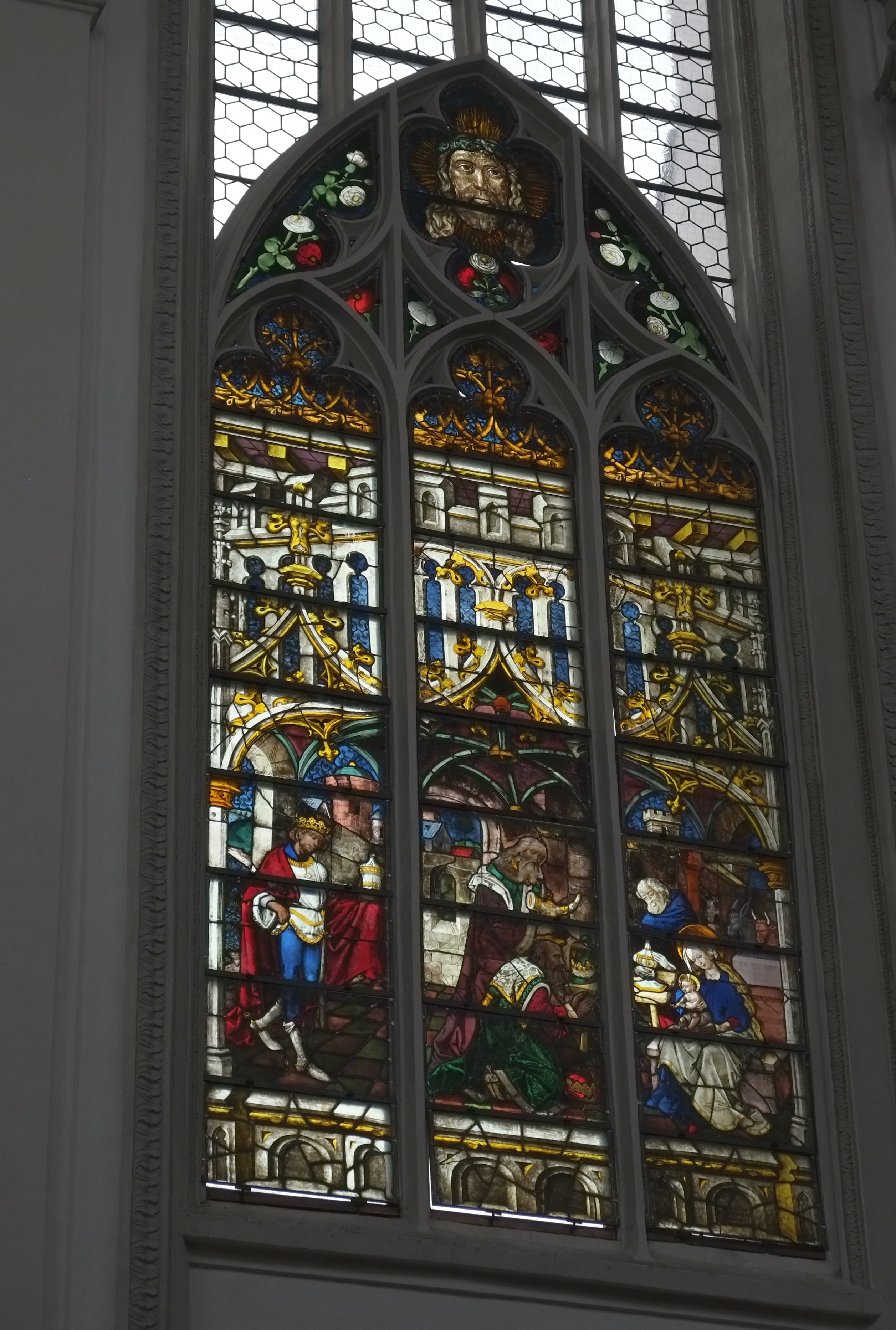 Bleiglasfenster in der Stadtpfarrkirche Mariä Himmelfahrt in Landsberg am Lech (Bayern, Deutschland). Beschreibung siehe: Susanne Fischer: Die Münchner Schule der Glasmalerei. Studien zu den Glasgemälden des späten 15. und frühen 16. Jahrhunderts im Münchner Raum. (Arbeitshefte des Bayerischen Landesamtes für Denkmalpflege, Band 90) München 1997, S. 68, ISBN 3-87490-652-3